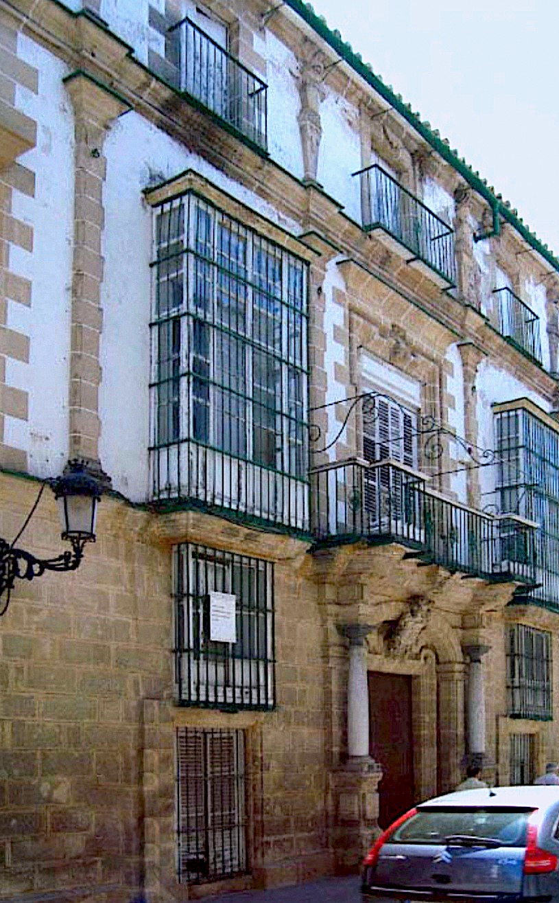 Palacio del siglo XVIII en El Puerto de Santa María (Cádiz), ejemplar de la arquitectura civil portuense que conserva la mayoría de las notas propias del barroco del siglo XVIII. Perteneció a las familias Álvarez de Cuevas, Martínez-Colom y Bernabé Madero.